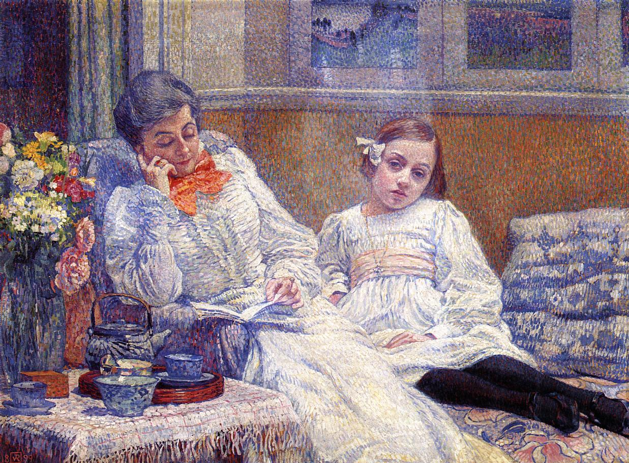 Sujet: Théo Van Rysselberghe (1862-1926): Bild vu senger Fra a sengem Kand Quell: Wiki commons eropgeluede vum JoJan]. Lizenz: Commentaire op This image comes from the Project Gutenberg archives. This is an image that has come from a book or document for which the American copyright has expired and this image is in the public domain in the United States and possibly other countries.